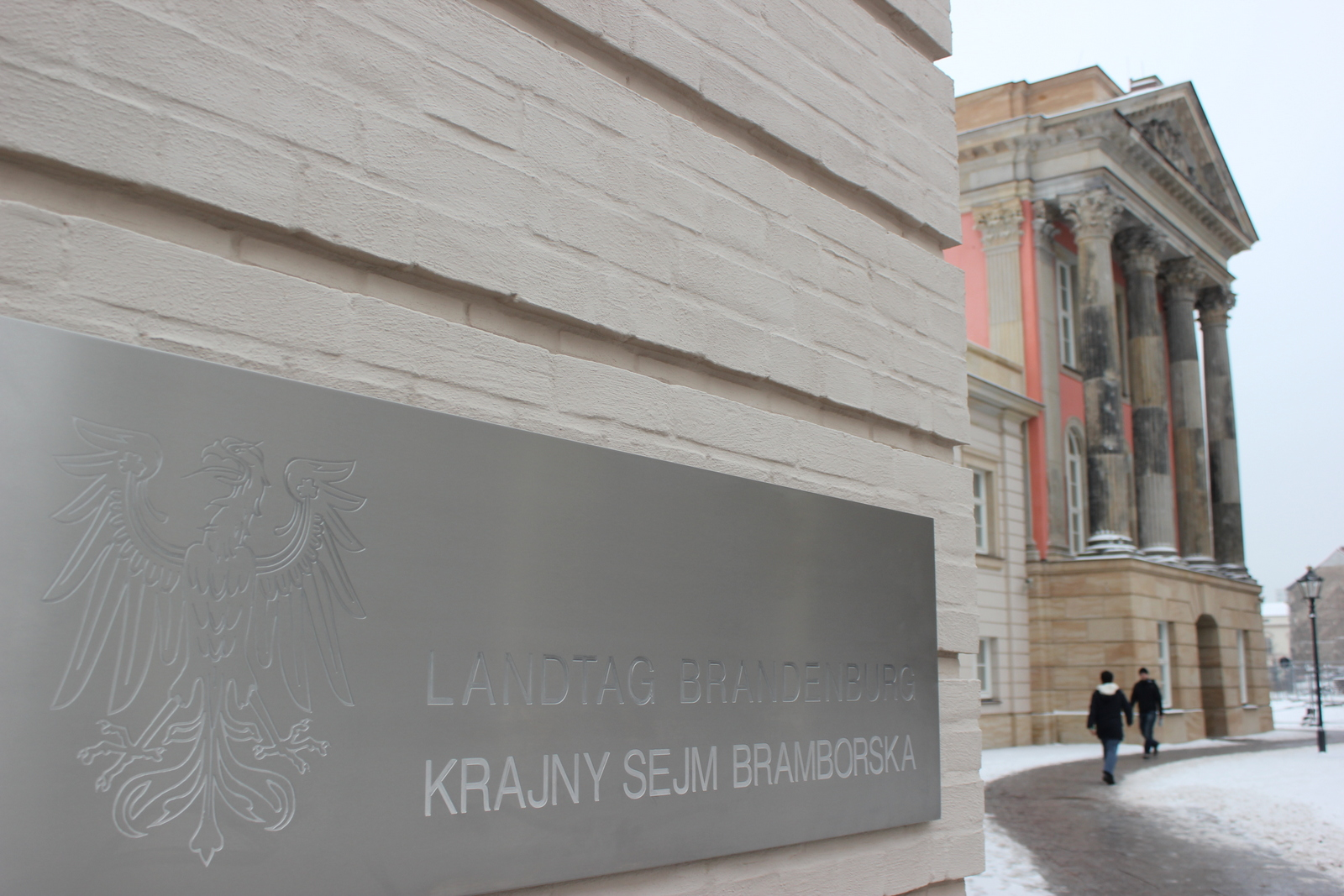 Hornjoserbsce: Dwurěčna němsko-delnjoserbska taflička při zachodźe noweho braniborskeho krajneho sejma.